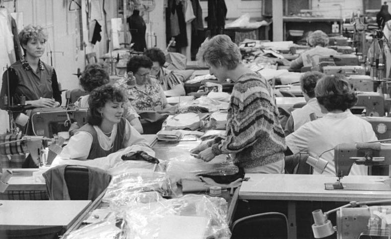 ADN-ZB-Grubitzsch-15.12.1986-pra-Leipzig: Jugend-Am Jugendmodeideenwettbewerb der FDJ beteiligen sich auch die Mitglieder des Jugendmodeklubs vom VEB Bekleidungswerke "vestis". Die Gestalter, Konstrukteure, technischen Mitarbeiterinnen und Näherinnen bekommen ihre Entwicklungsthemen vom Kombinat Oberbekleidung Lößnitz und vom Modezentrum der Jugend Berlin. Im Ideenwettbewerb konnten sie bereits vier Anerkennungsurkunden für ihre aktuellen Modelle erhalten. 80 Prozent der vom Jugendmodeklub entwickelten Stücke wurden in die Produktion übernommen. Zuvor wurden sie in der Musternäherei (Foto) erprobt. - siehe auch 1986-1215-8 und 9N